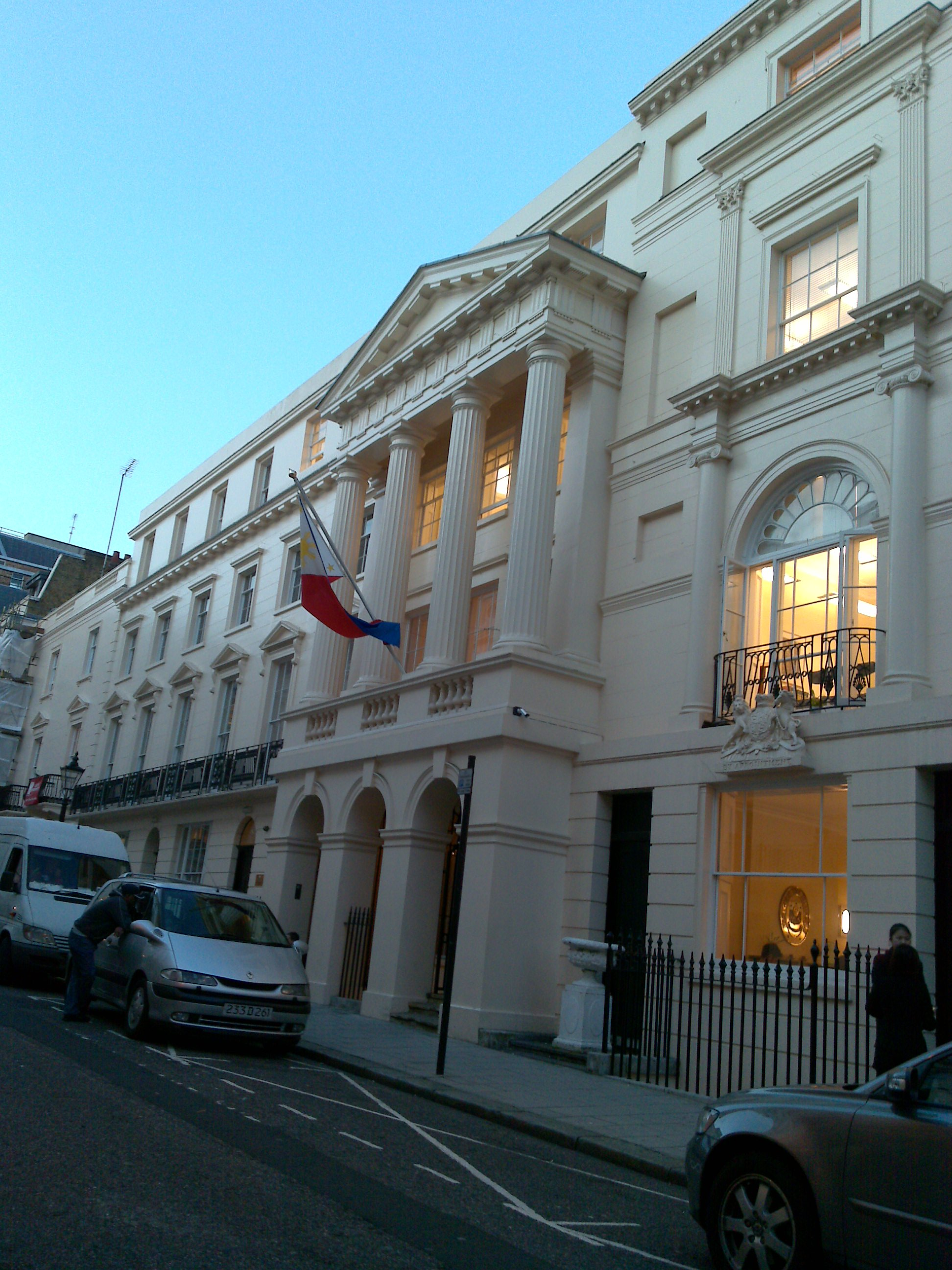 Philippines Embassy, London